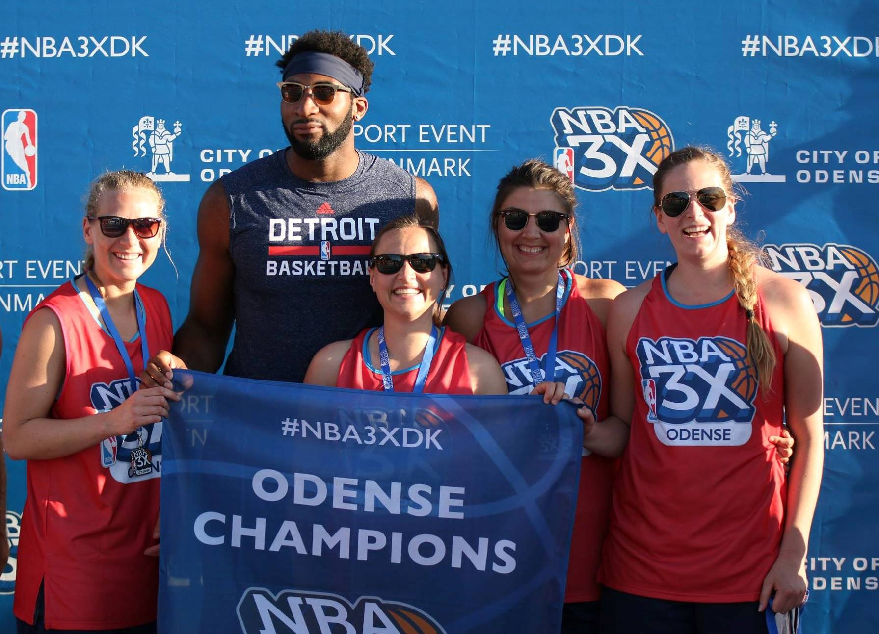 Ullernjenter vinner turnering i Odense